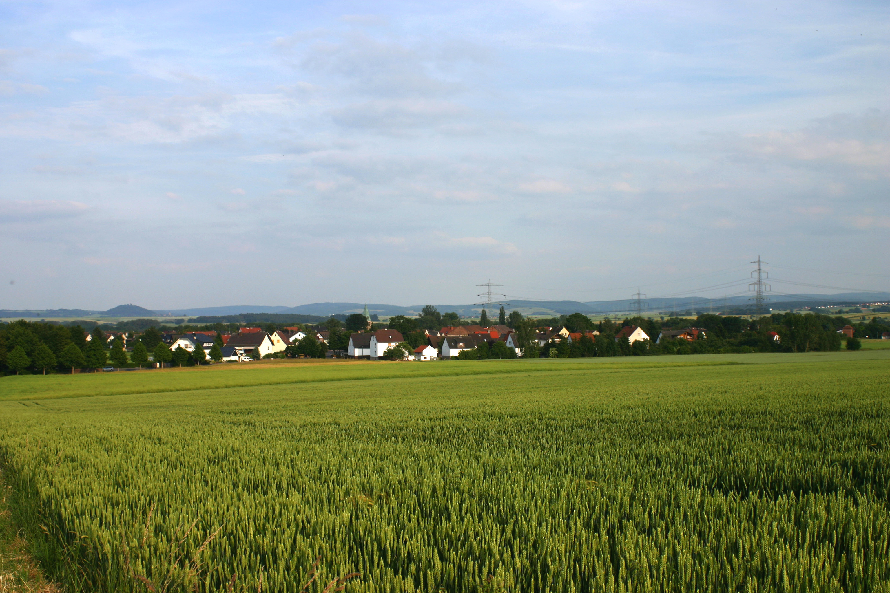 Borken (Hessen) - Panorama von Gombeth